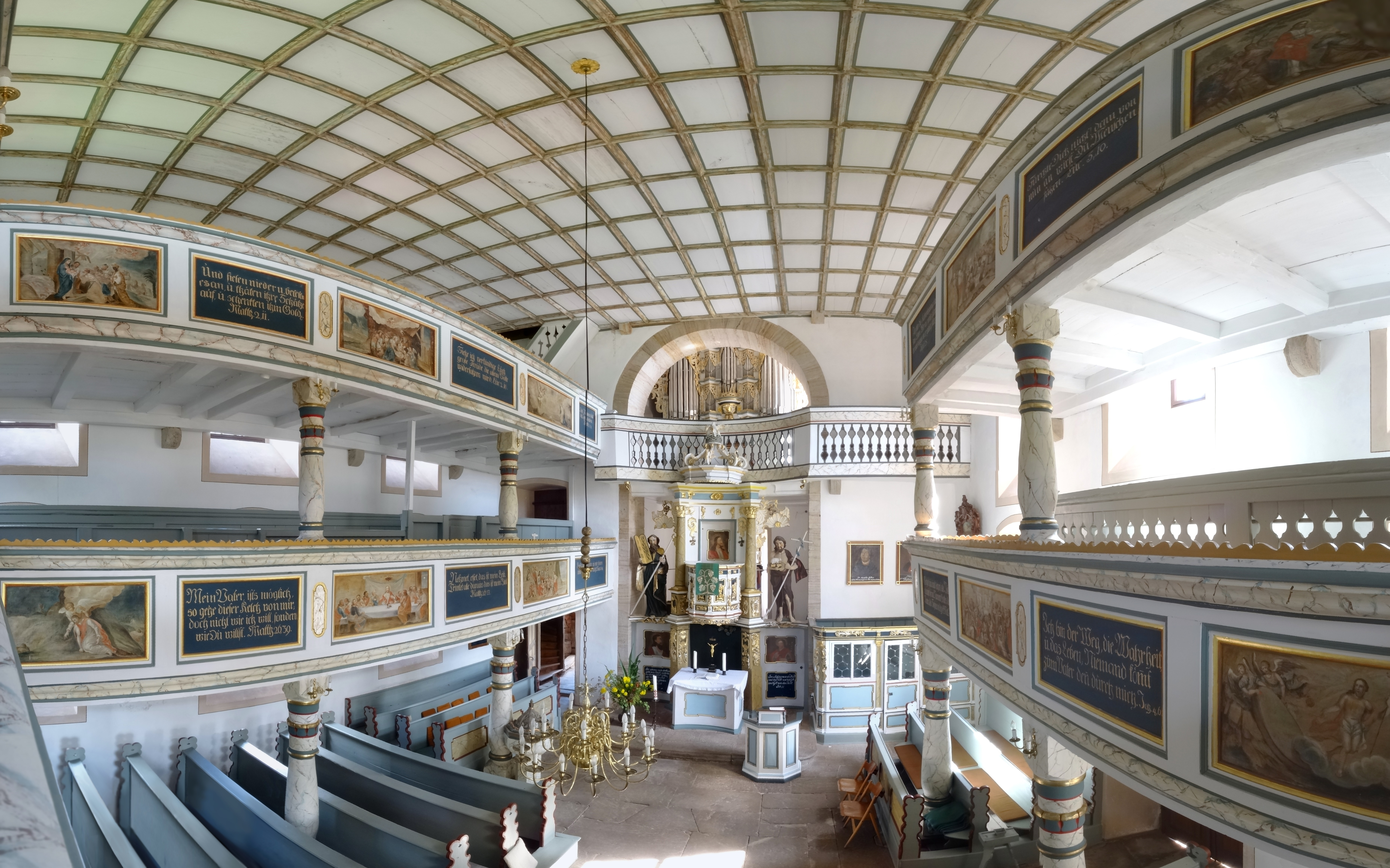 Innenraumpanorama Dorfkirche Wohlmuthausen